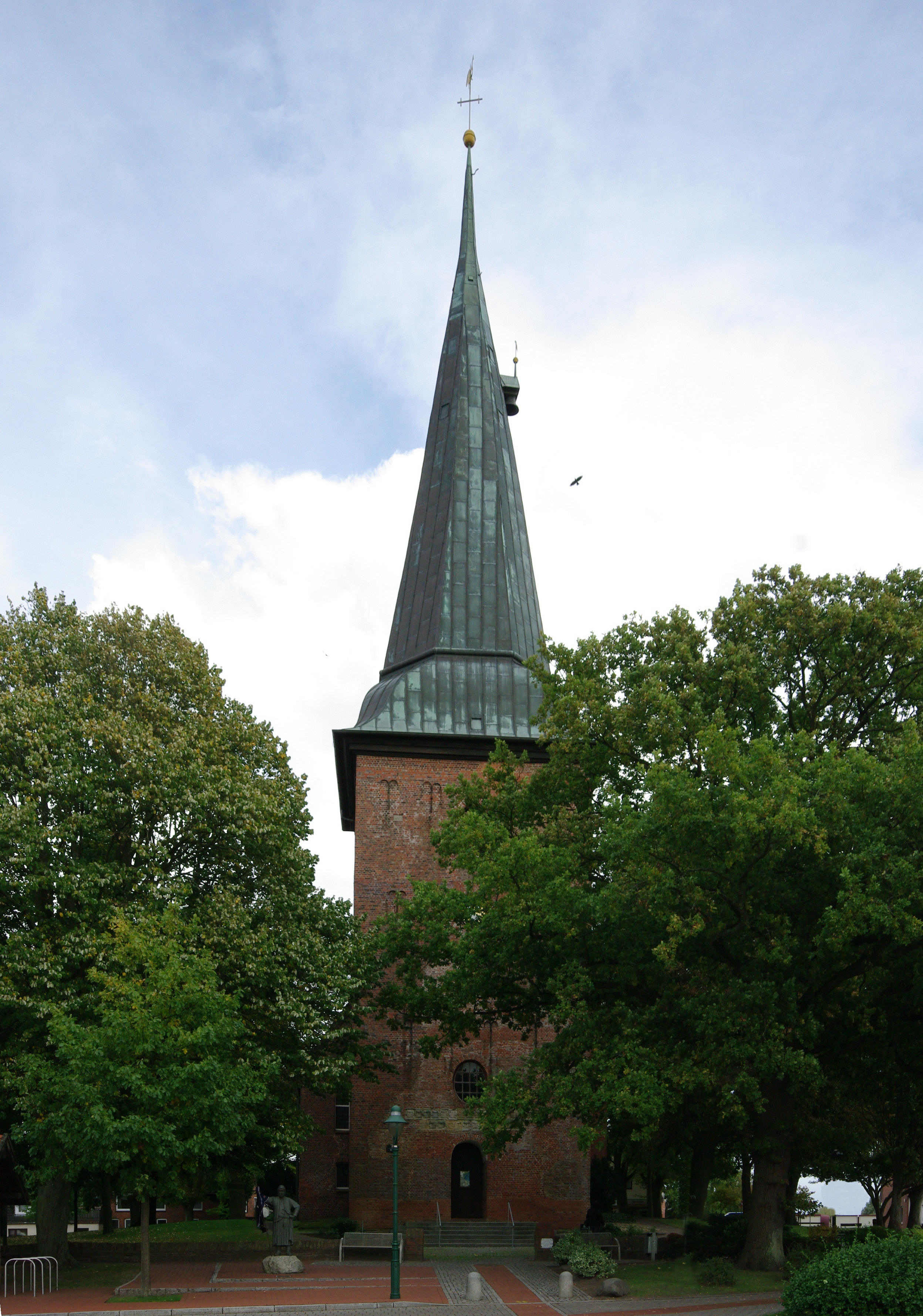 Der Kirchturm von St. Jacobi